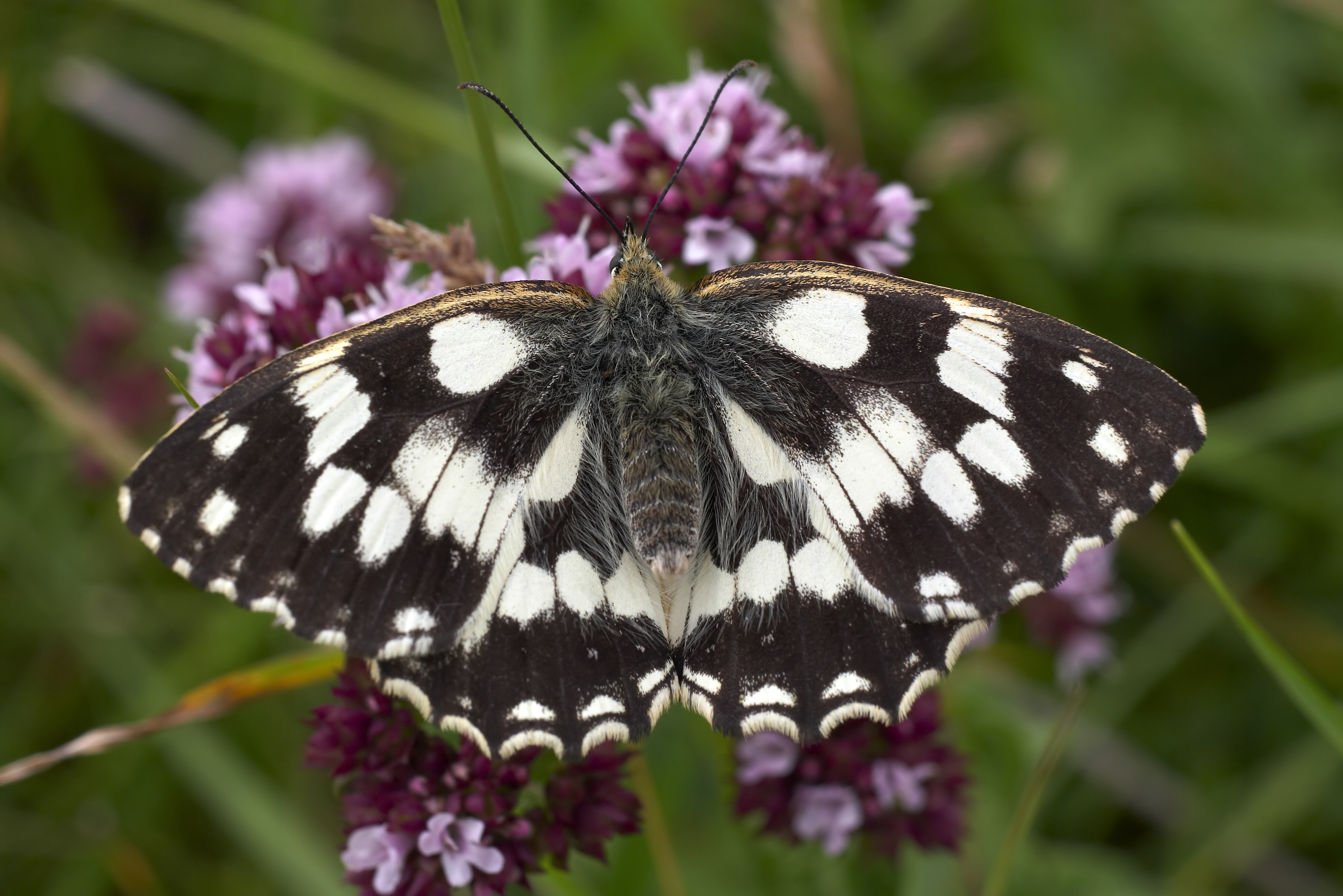 Melanargia galathea